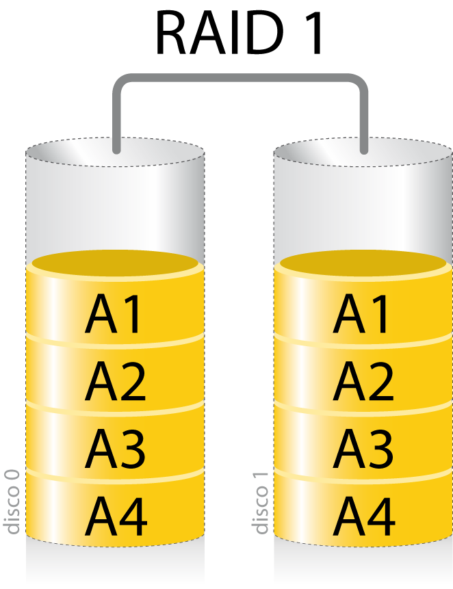 Esquema RAID 1